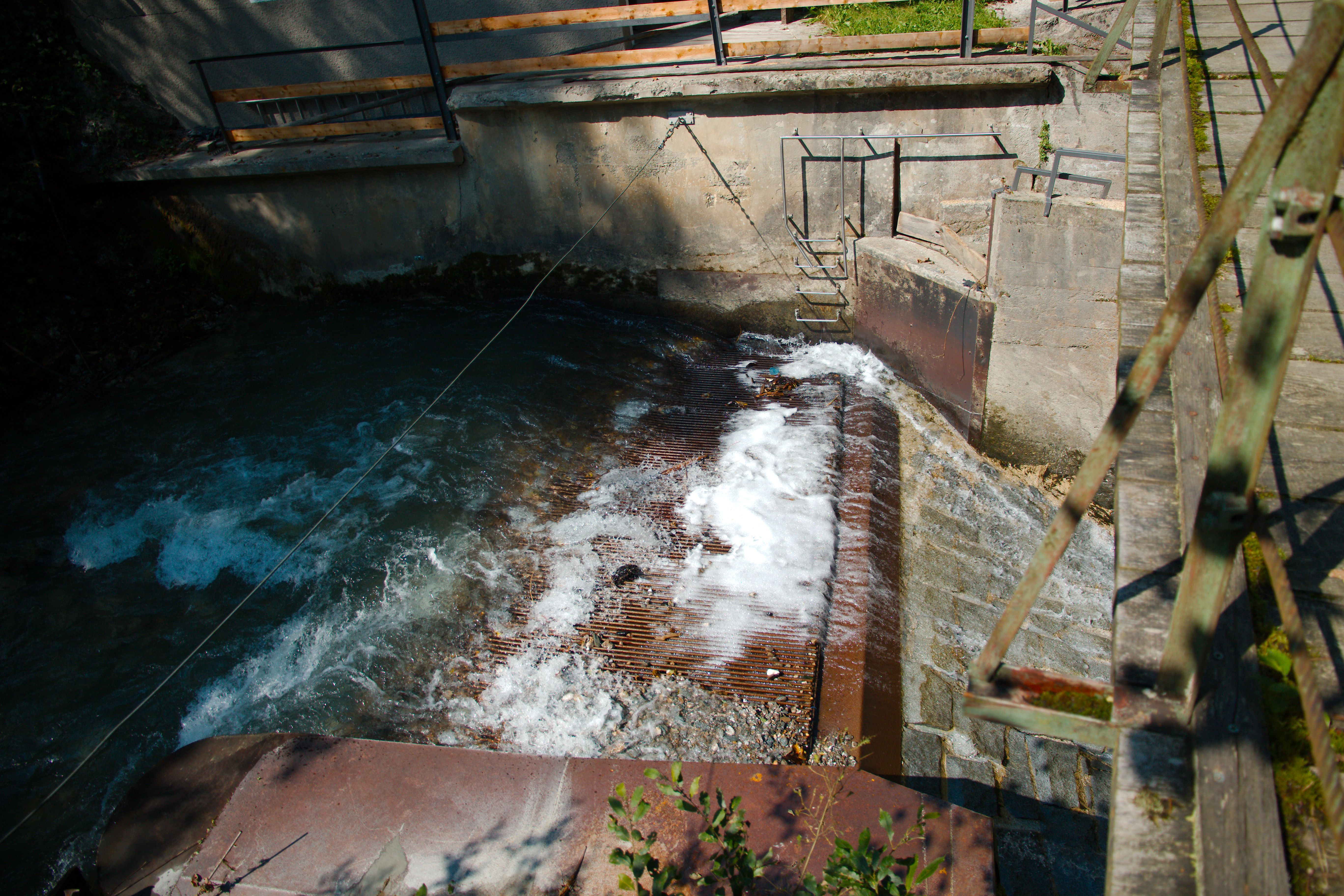 Tiroler Wehr am Weerbach bei der vorderen Hängebrücke